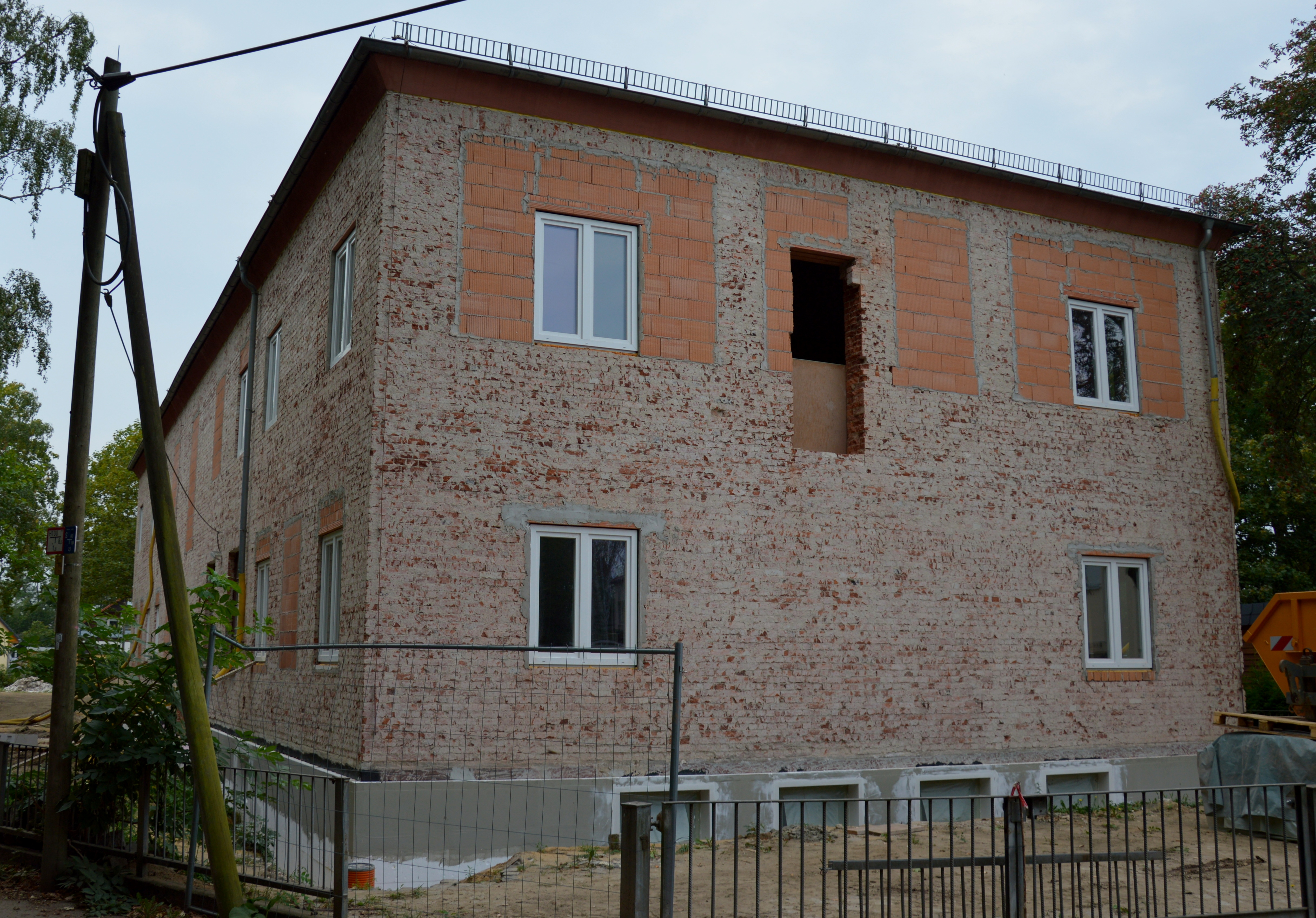 Haus Zur Muttereiche 2 in Magdeburg